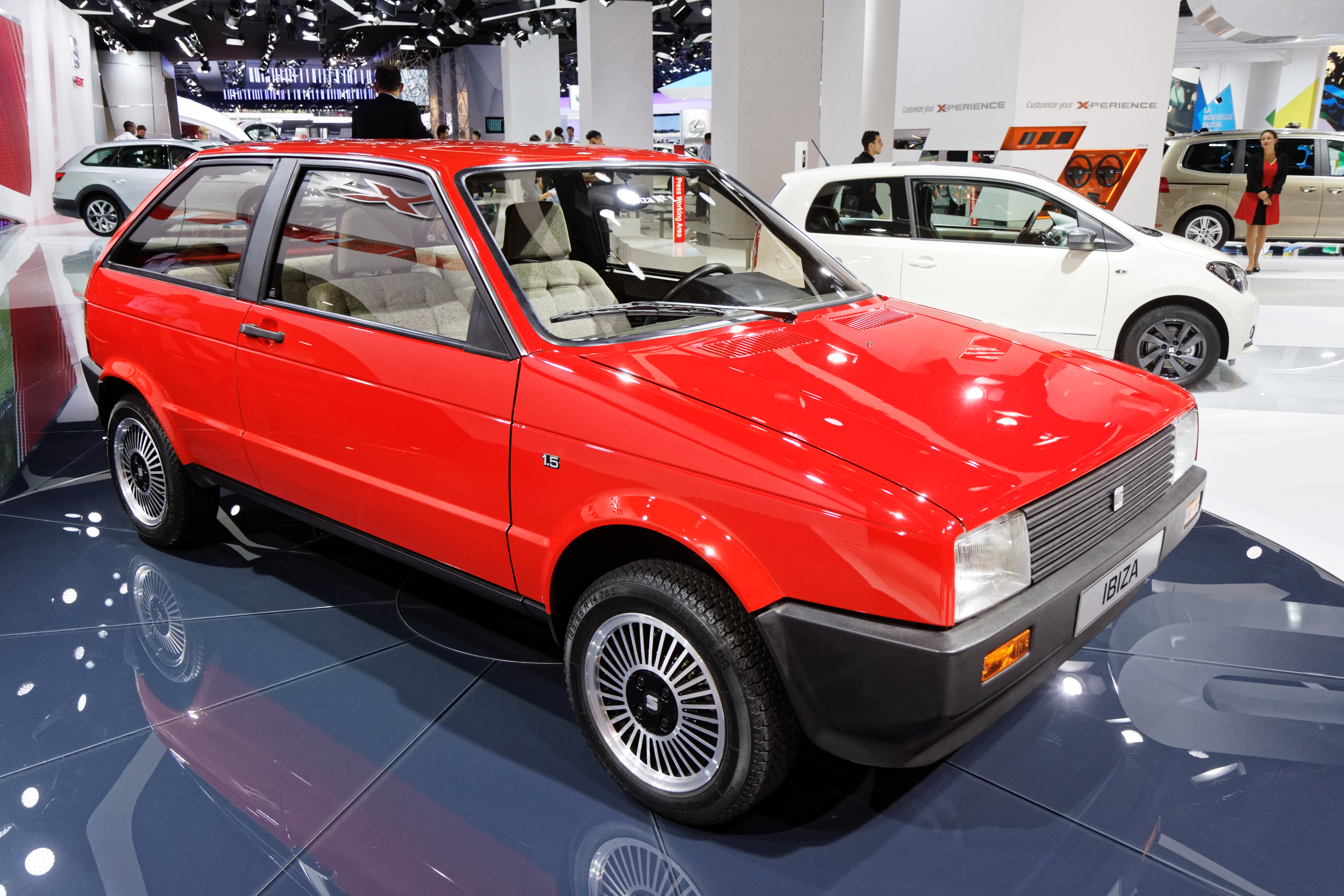 Une Seat Ibiza première génération présentée lors du mondial de l'automobile de Paris 2014.